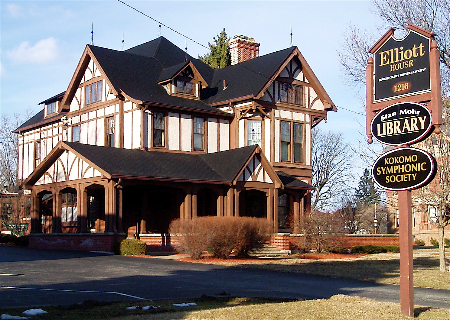 Elliott House, Kokomo, IN